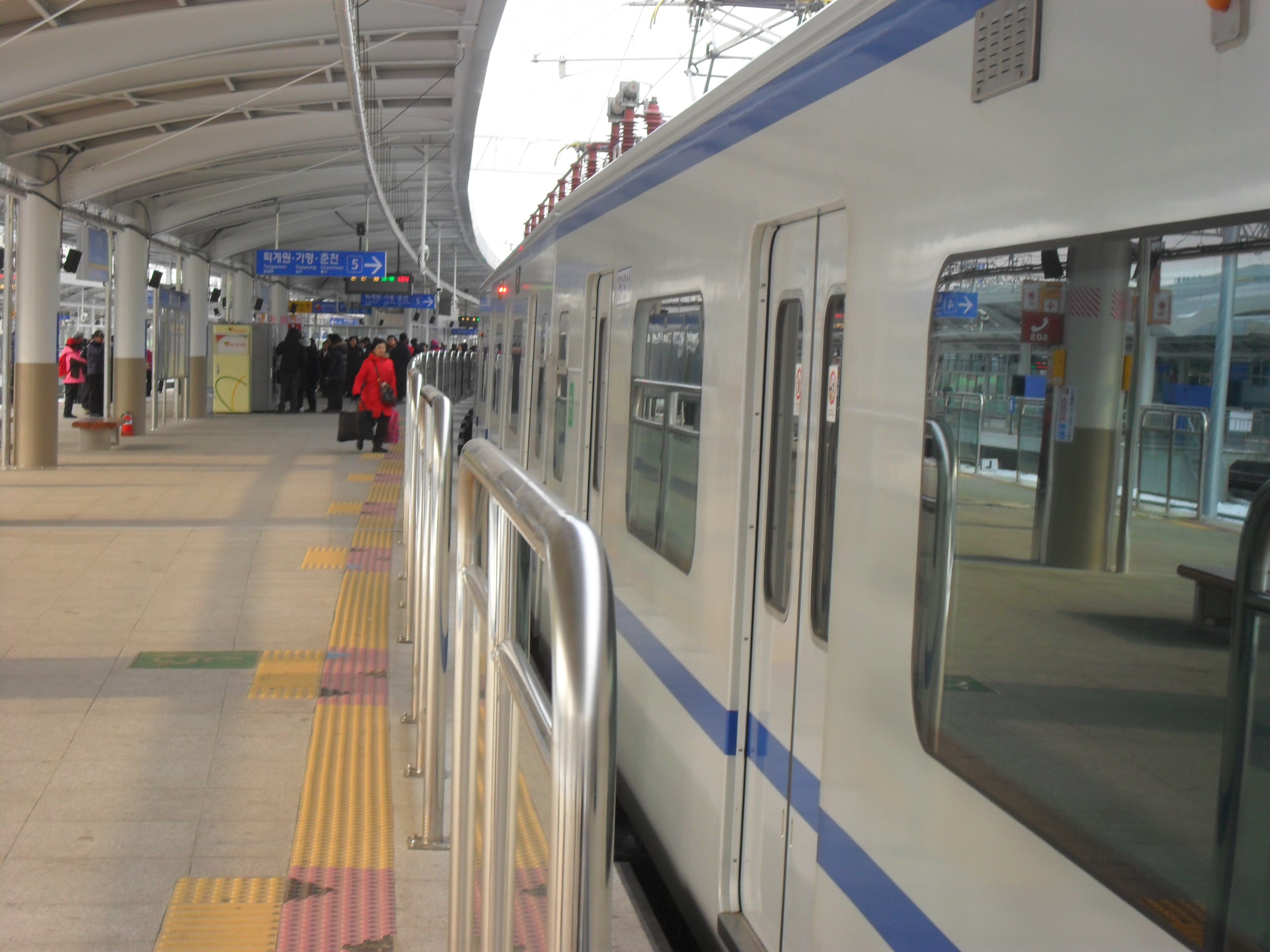 上鳳駅5番線（京春線用）